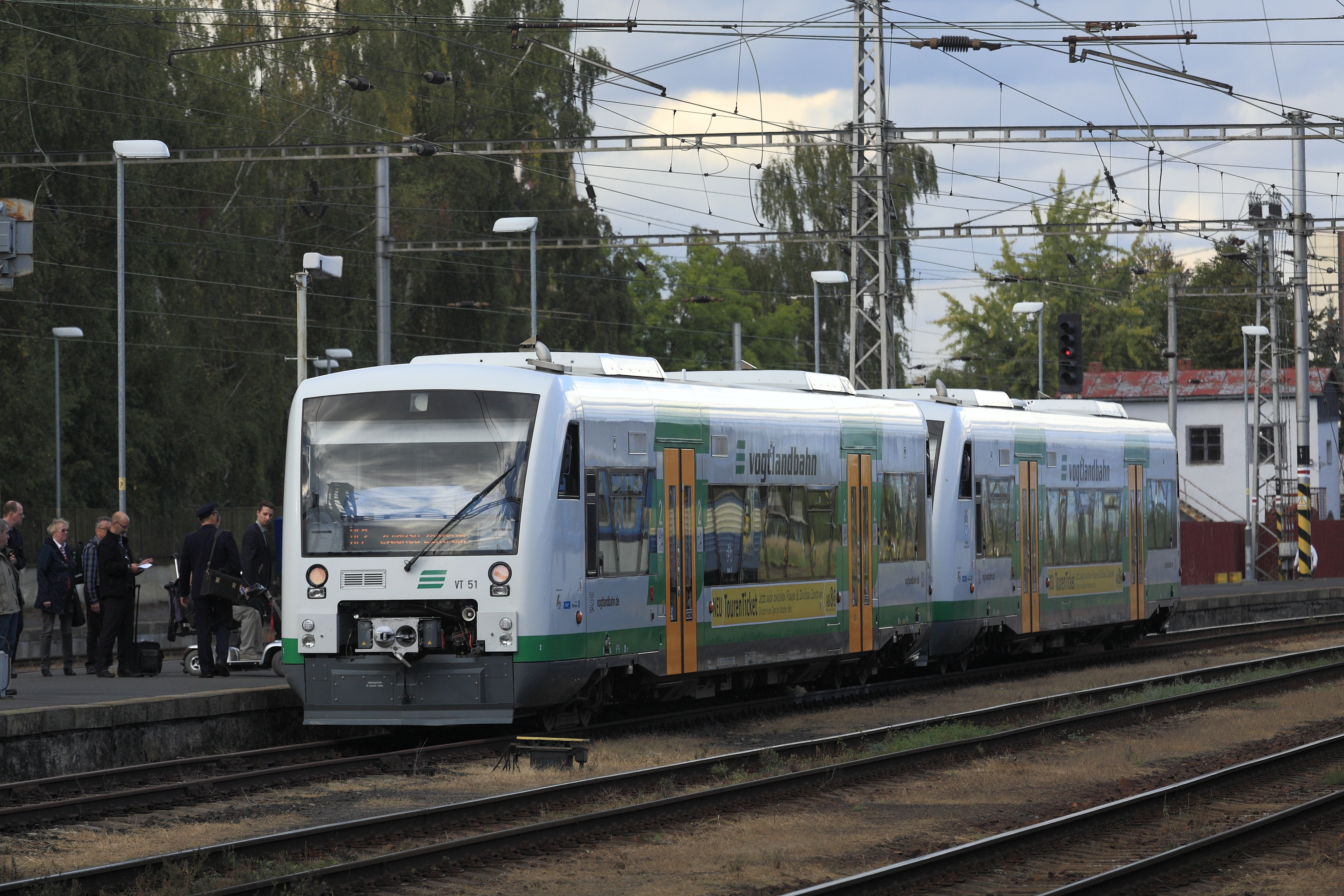 Personenzug von Zwickau über Werdau beim Wendehalt. Diese Triebwagen der Reihe 650 sind für die Strecke Zwickau Hbf–Zwickau Zentrum nach BO Strab mit Bremslichtern und Blinkern ausgerüstet.